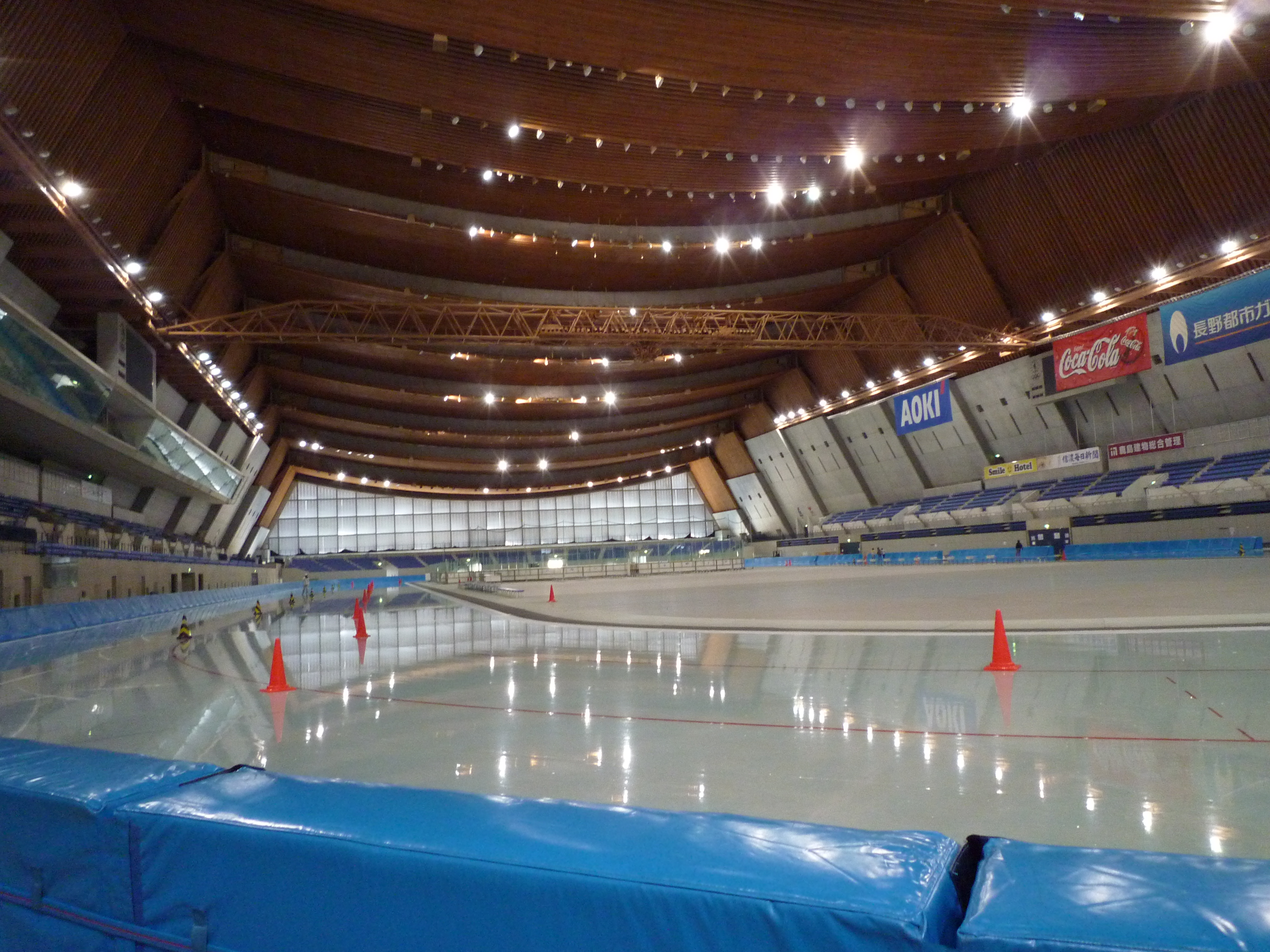 エムウェーブの屋内リンクの写真。デジカメで撮影。